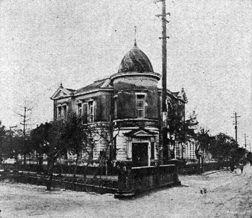 宜蘭街役場